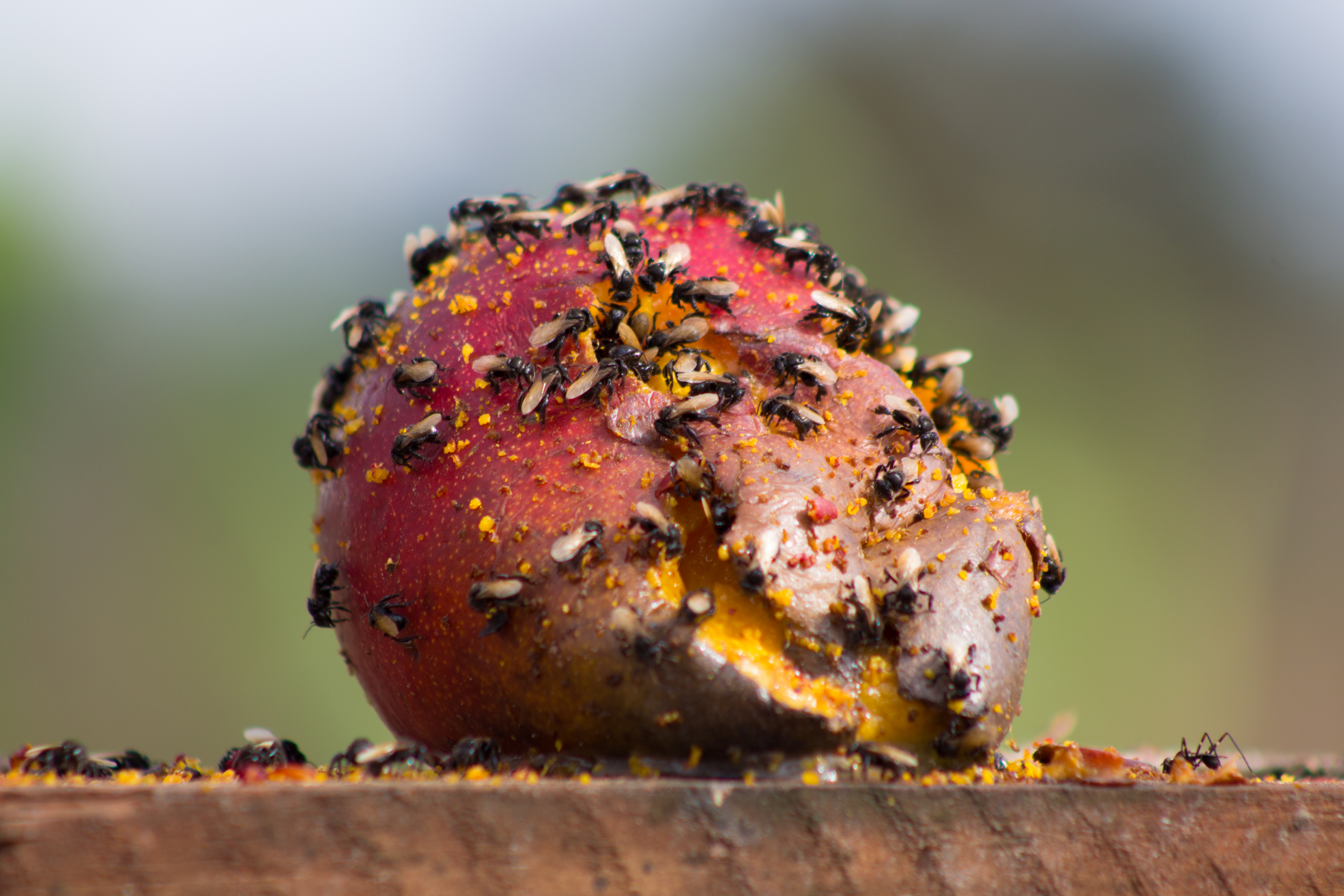 Ocupação Capão das Antas_41_Romerito Pontes